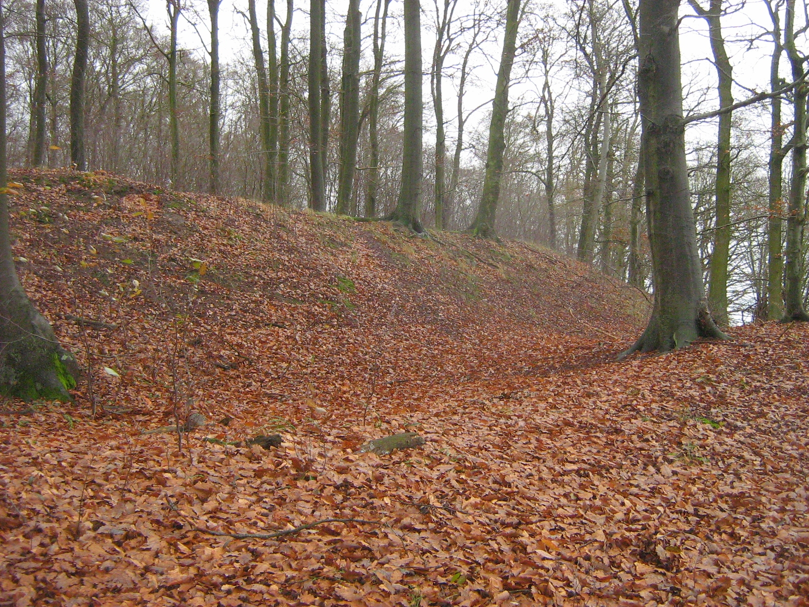 Wall der Vorburg 2 des Burgwalles auf dem Schanzenberg bei Rothemühl, Landkreis Uecker-Randow.